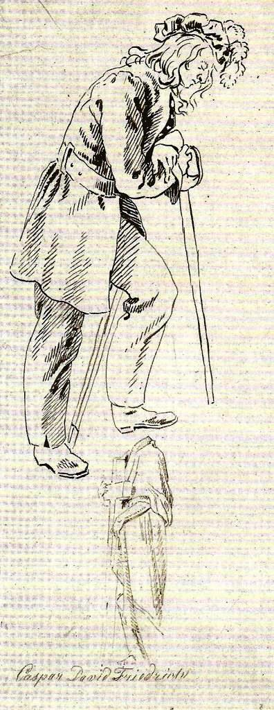 Caspar David Friedrich: „Studie zu ,Huttens Grab‘, um 1824“. Pinsel in Schwarz und Grau, 27,8 x 11,0 cm, Privatbesitz